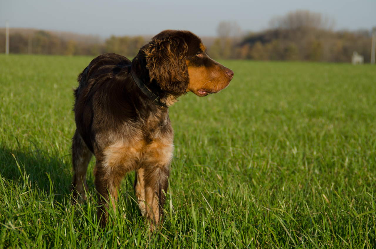 Notre épagneul picard, Gibbs des Chaumes de Thiérache à 6 mois